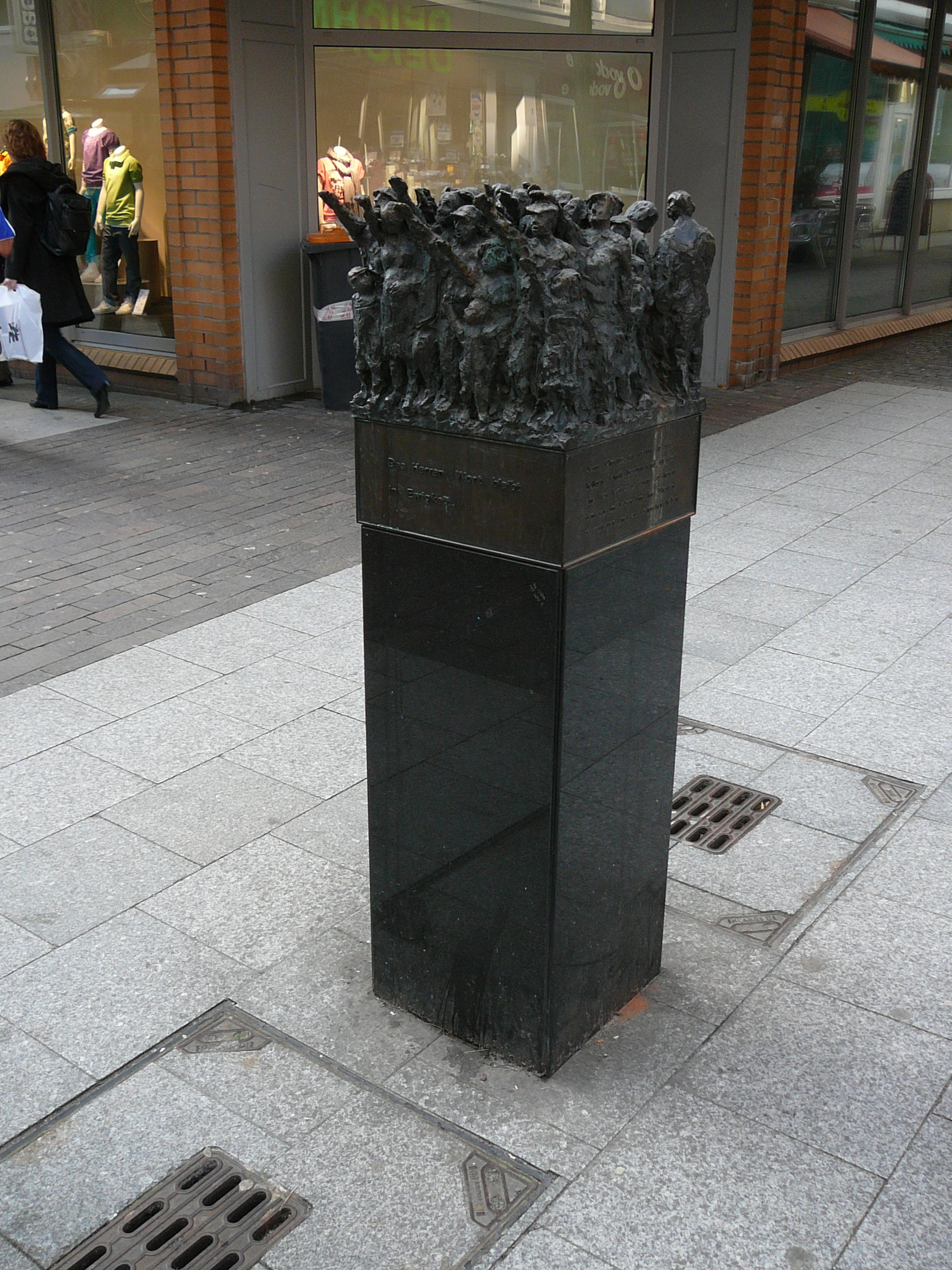 Werth, Wuppertal-Barmen